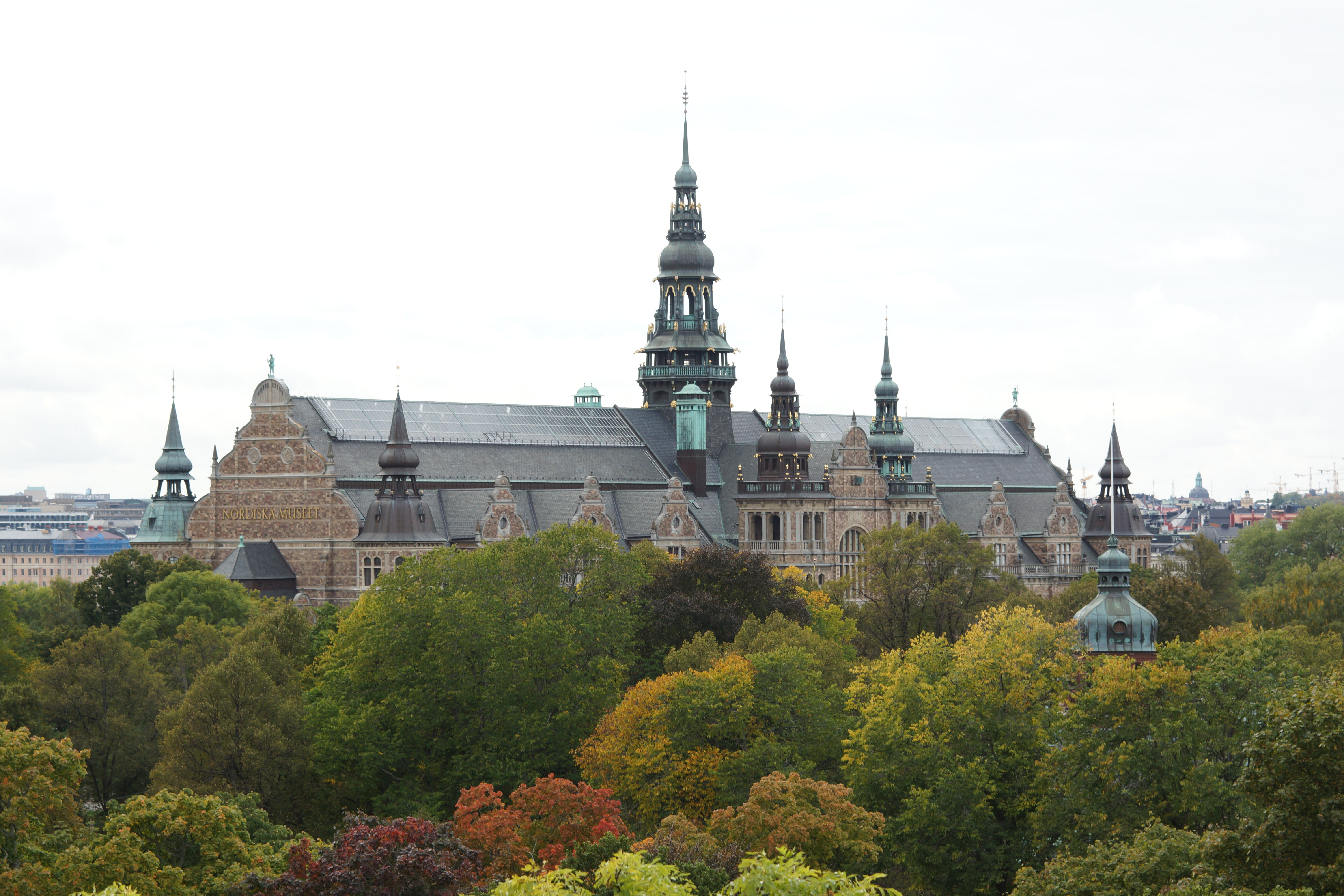 Nordiska Museet